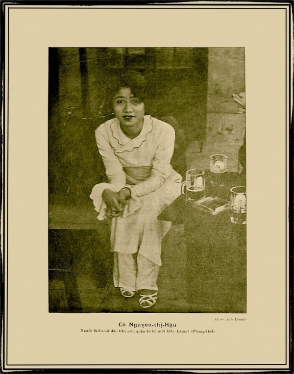 Bà luật-sư Nguyễn-thị-Hậu mặc y-phục tân-thời kiểu Lemur. Phong-Hóa tuần-báo 1936.